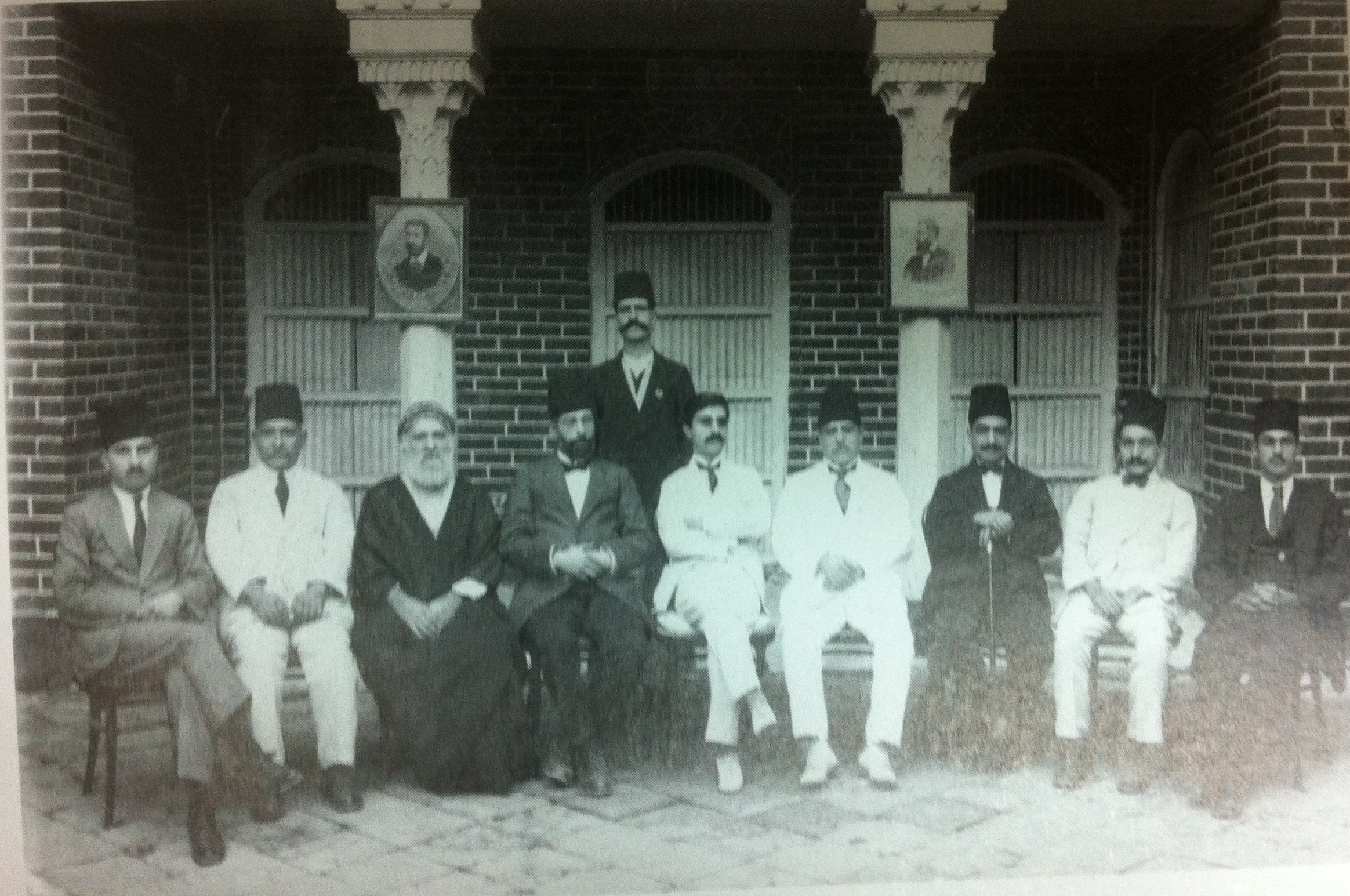 Zionist activists in Baghdad, 1922. Standing: Dr. Ariel Bension, first from left: Salmān Shīna, third from left:Rabbi Reuben Patia, fourth from left: Aharon Sasson ("the teacher") פעילים ציונים בבגדאד, 1922. בעמידה - ד"ר אריאל בן ציון, שליח קרן היסוד. בישיבה משמאל לימין: העו"ד סלמן שינה, העו"ד יוסף אליאס, הרב ראובן פתיה, אהרן ששון ("המורה"), מנשה ג'ורג'י, עו"ד סלח קטאן, ומזכיר קרן היסוד